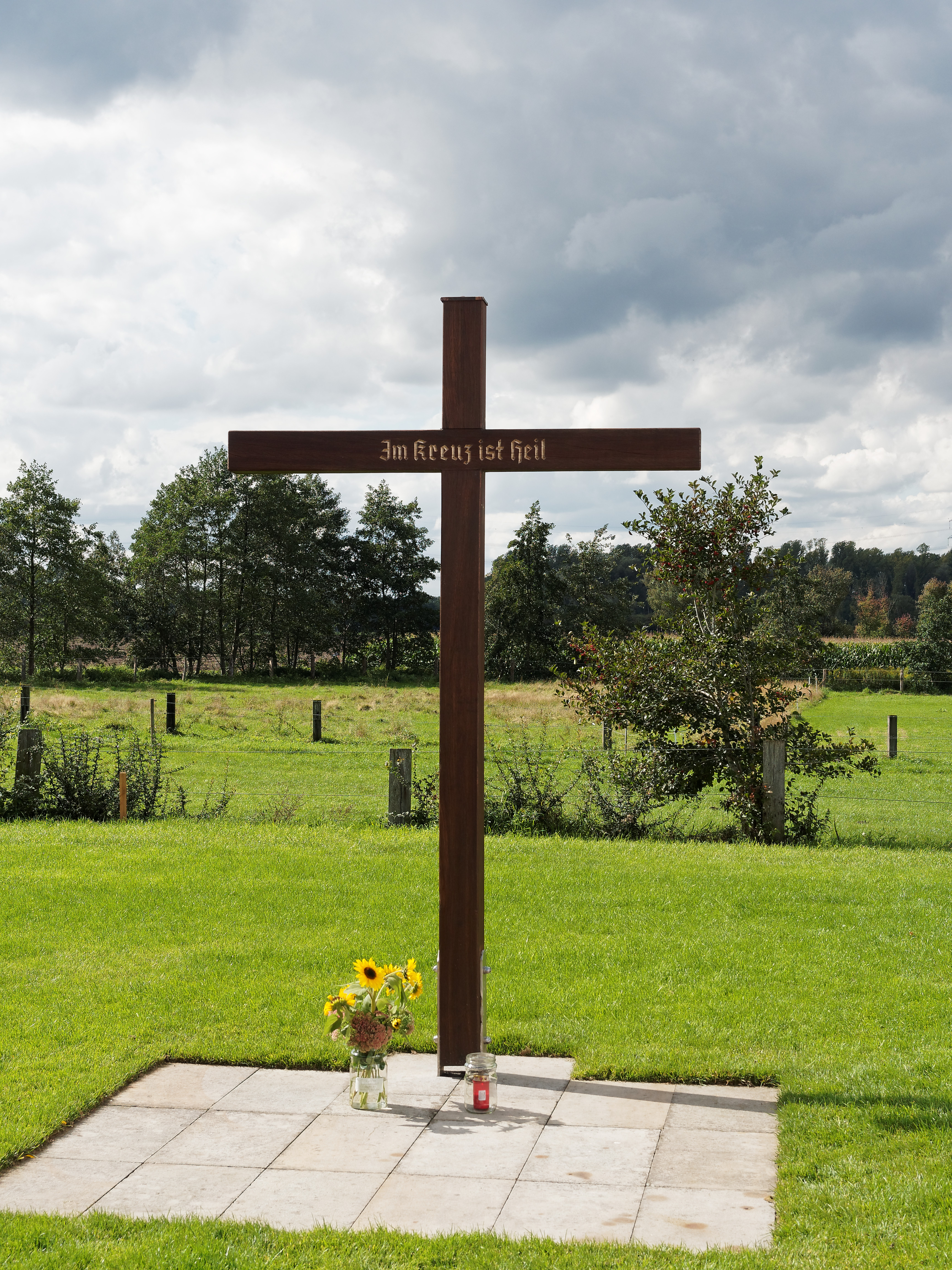 Tag des offenen Denkmals 2017, Kreuz aus Spurlatten vor der Kapelle St Laurentius in Waltrop-Leveringhausen, Denkmal aus der Zeit um 1070. Erstmalig 1343 urkundlich erwähnt.